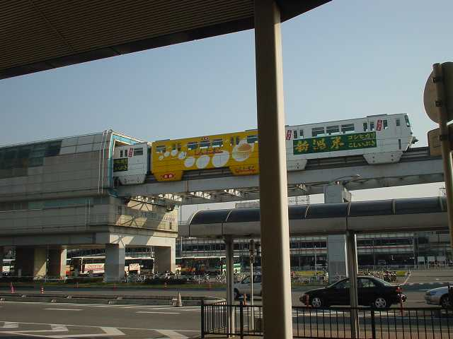 大阪モノレール大阪空港駅